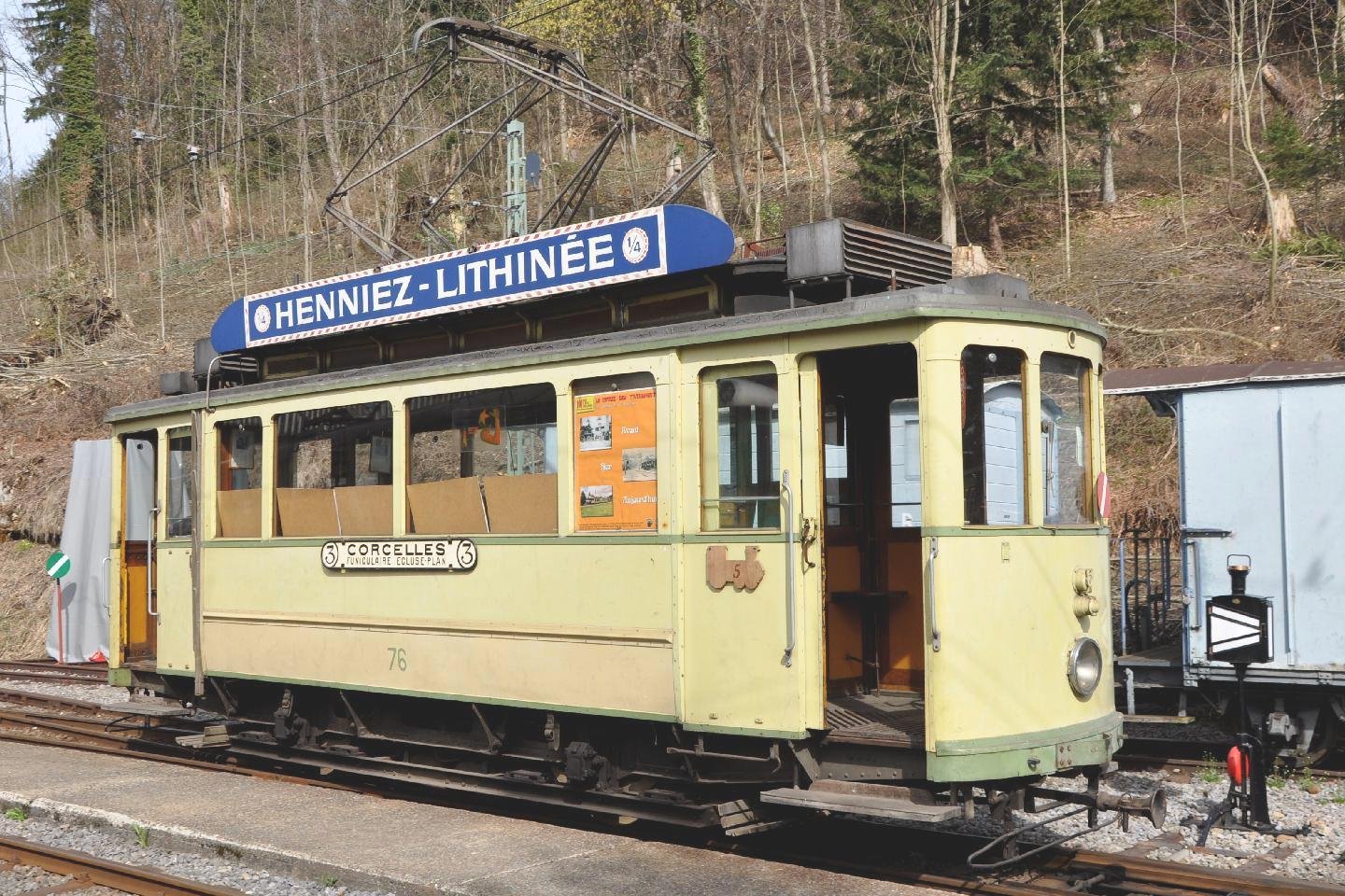 Historischer Strassenbahn Motorwagen Ce 2/2 76 der ehemaligen Tramways de Neuchâtel (TN) auf dem Museums-Areal der Museumsbahn Blonay–Chamby (BC) in Chamby-Musée (Chaulin) im Frühling 2011.